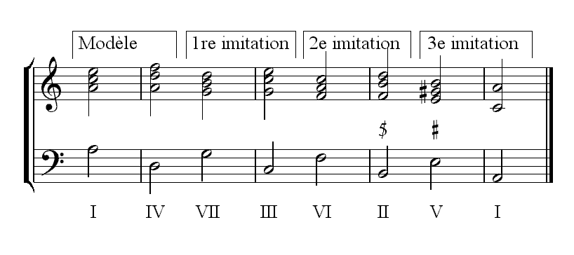 Description : Marche harmonique unitonale Source : Personnelle Licence : GFDL